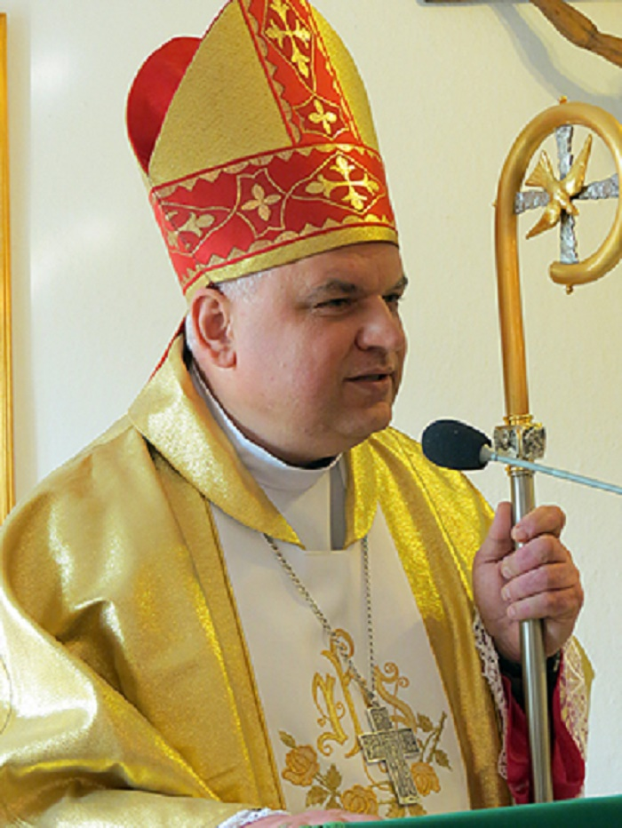 Polski duchowny katolicki, biskup pomocniczy diecezji odesko-symferopolskiej